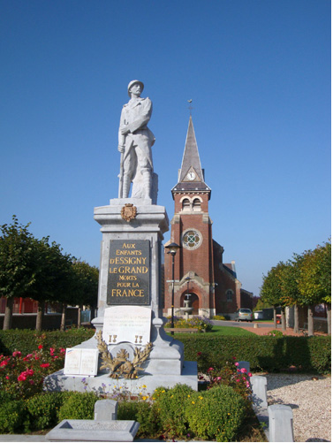 Essigny le grand